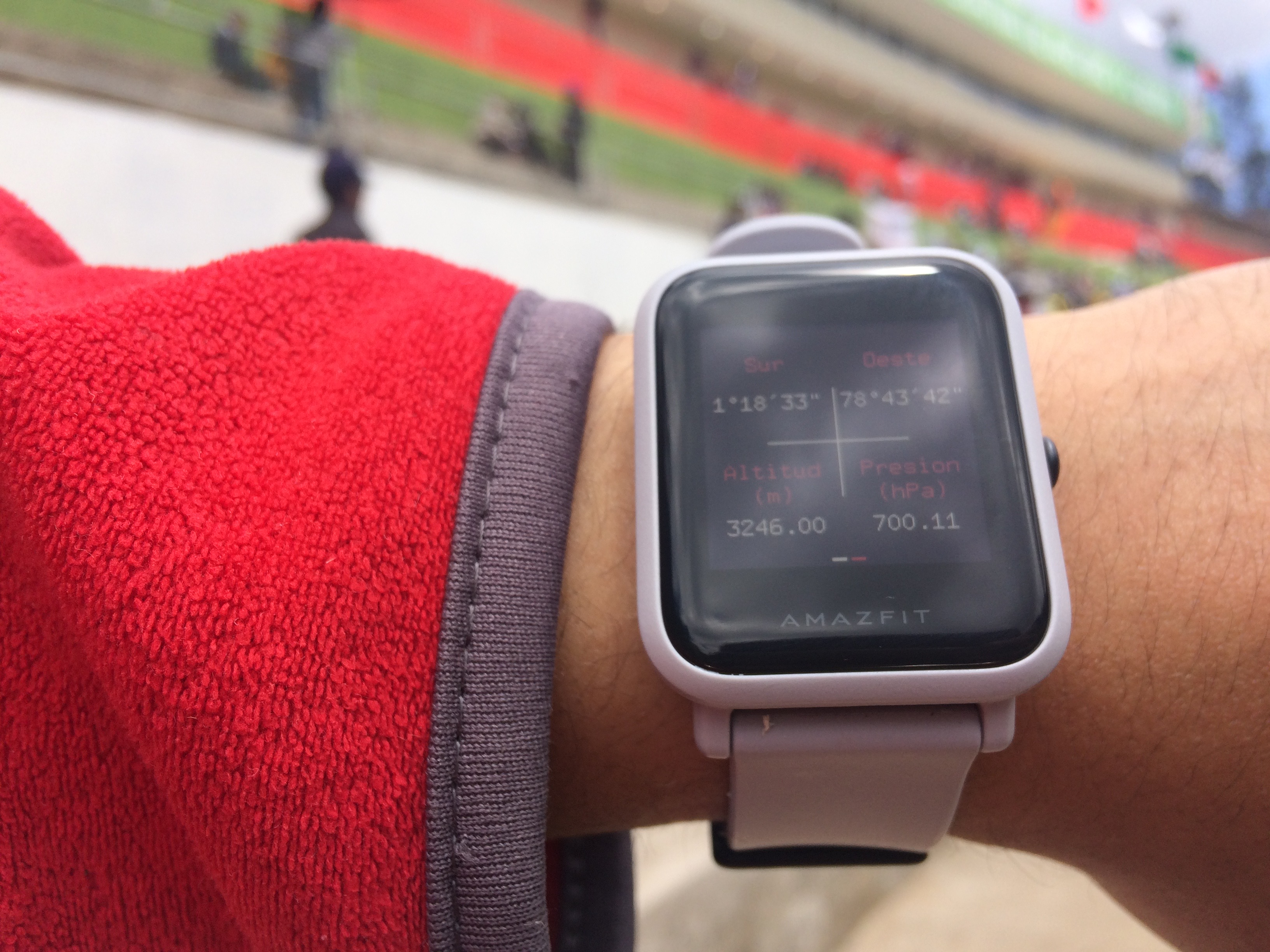 Altura del estadio de Mushuc Runa según el smartwatch Amazfit Bip